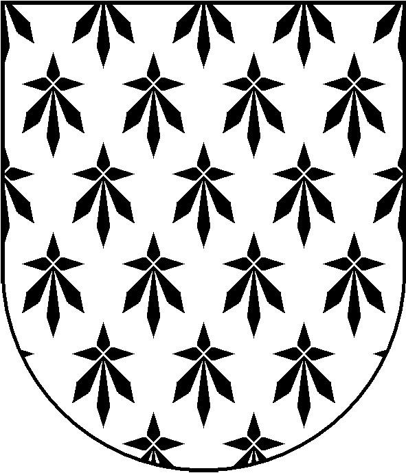 Brasão da família Barreto